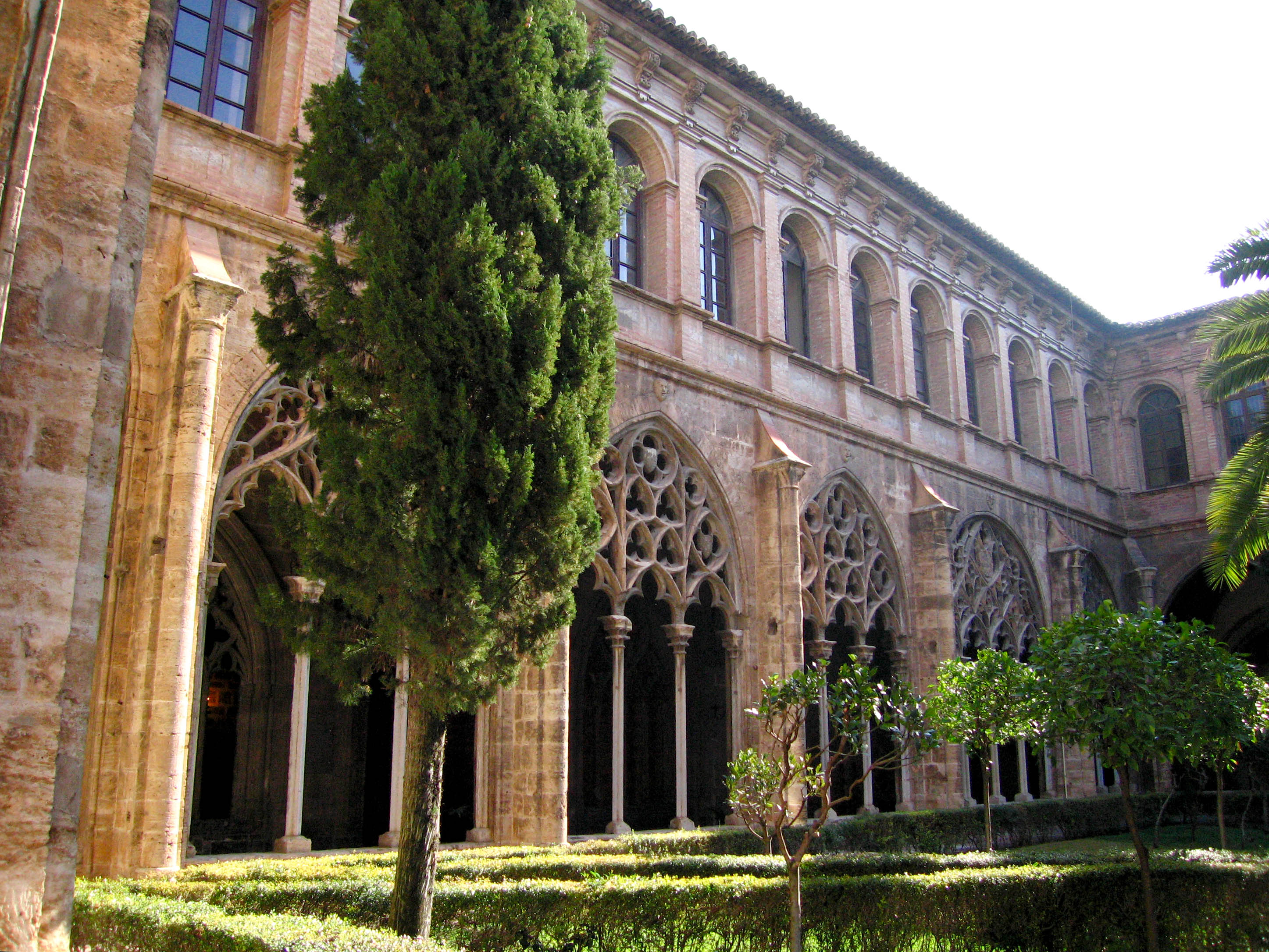 Claustre de sant Doménec (València)